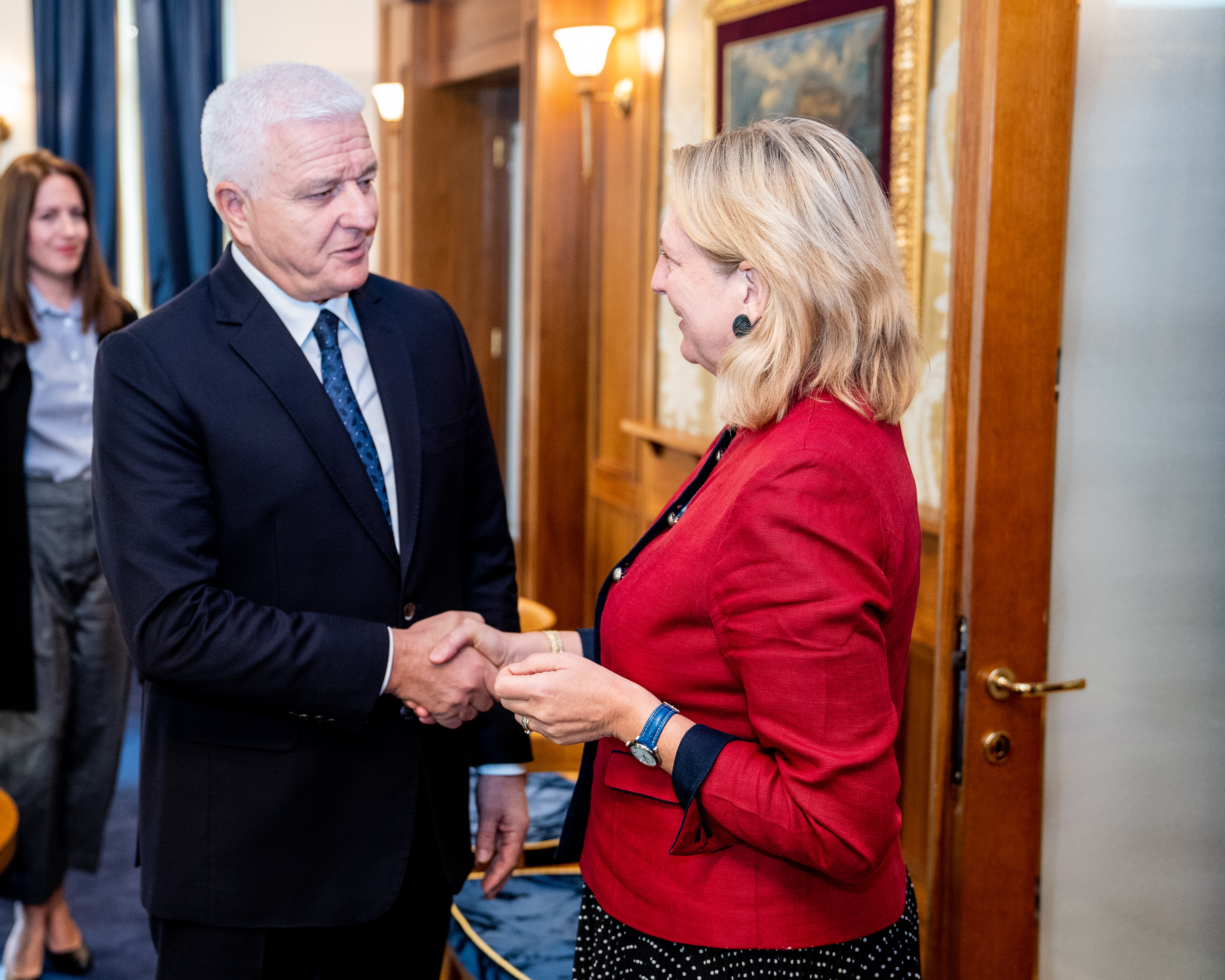 Außenministerin Karin Kneissl trifft den montenegrinischen Premierminister Duško Marković